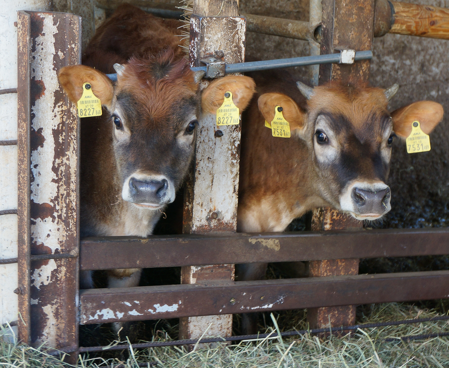 Jersey Jungrinder, Kärnten, Österreich, Europäische Union